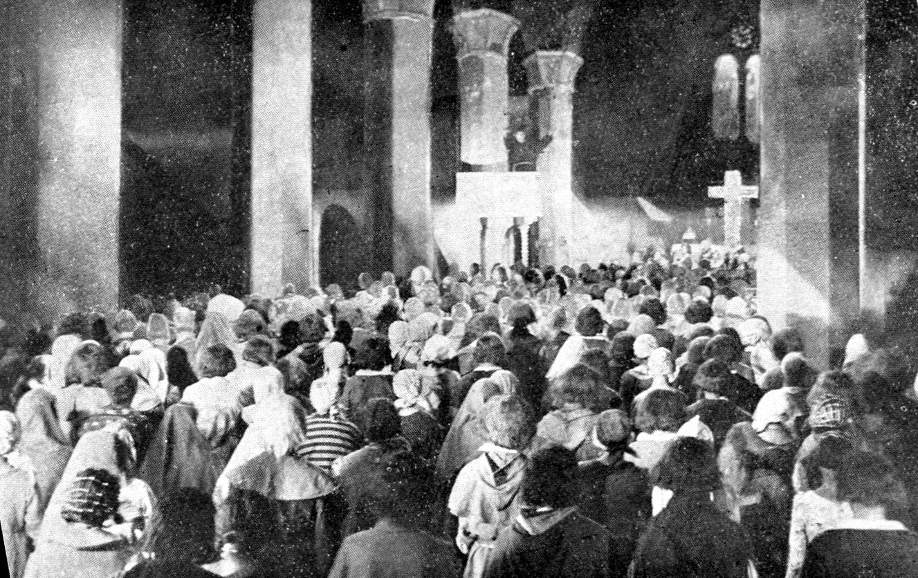 Fotogramma del film muto Antonio da Padova, il santo dei miracoli, regista Giulio Antamoro, produzione S.A.C.R.A.S. Roma - Firenze, 1931